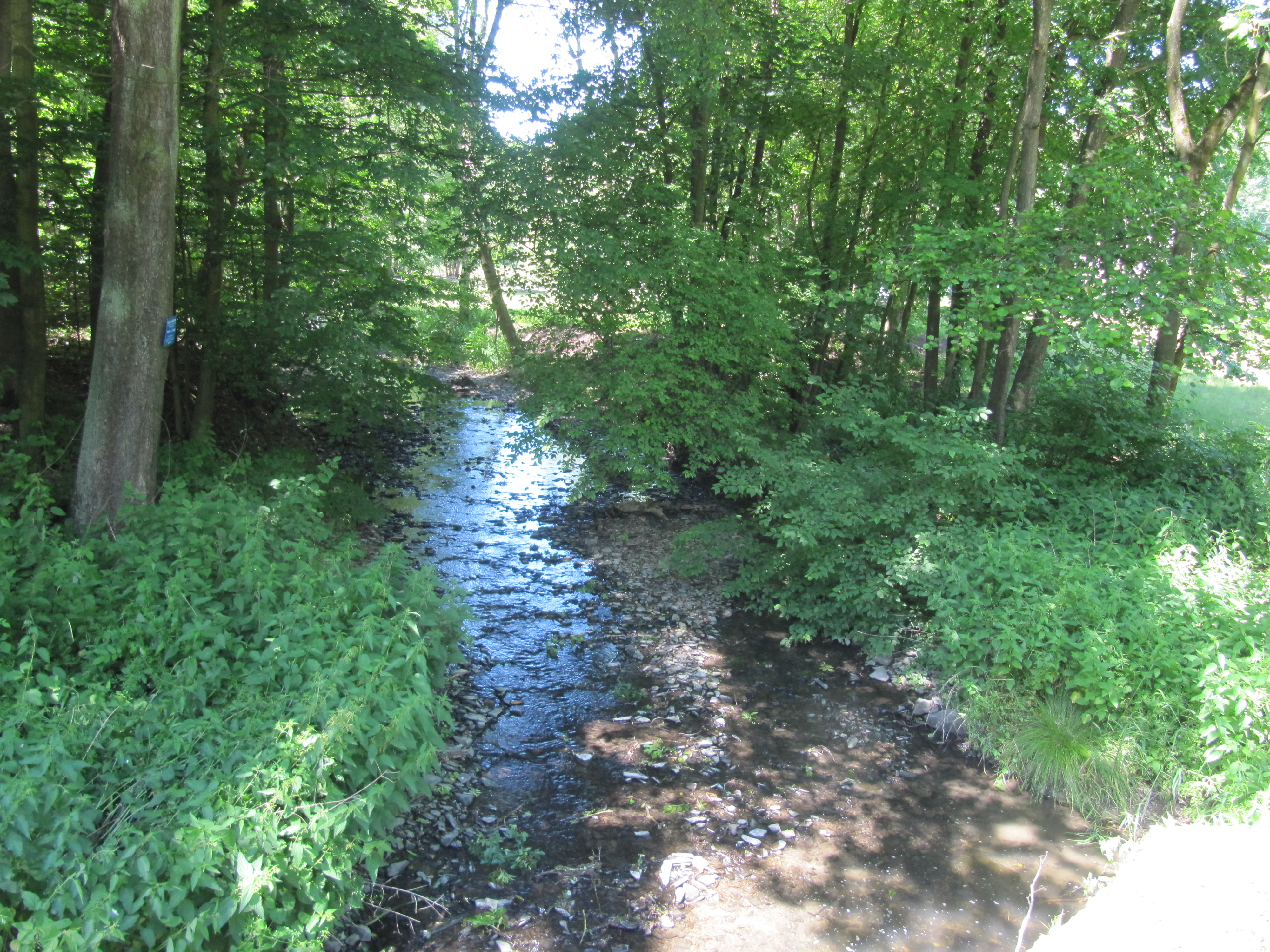 Kyjovice, okres Opava. Říčka Sezina u Panského mlýna.